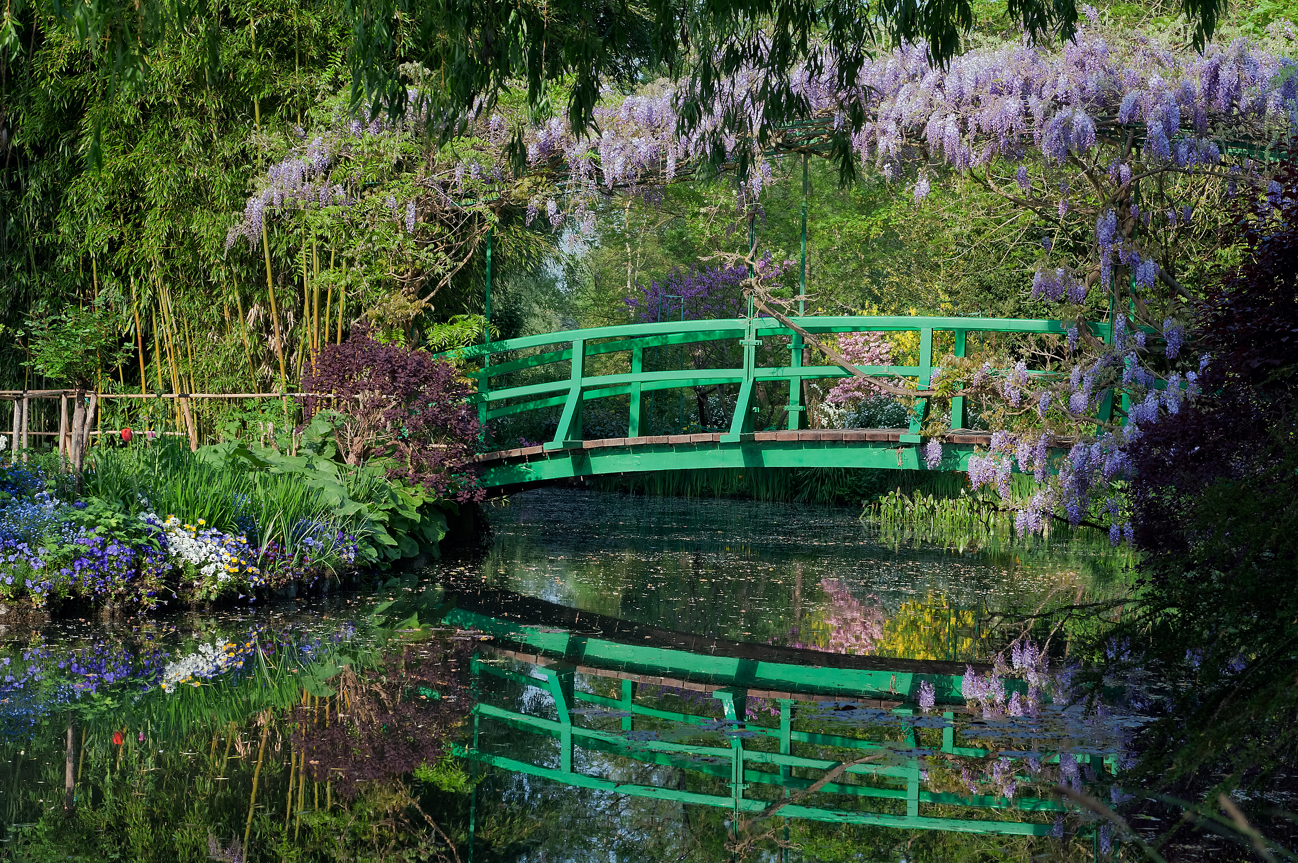 Glycine du "Pont Japonais" en fleurs; vu du bassin des Nymphéas, Giverny, Eure, France.